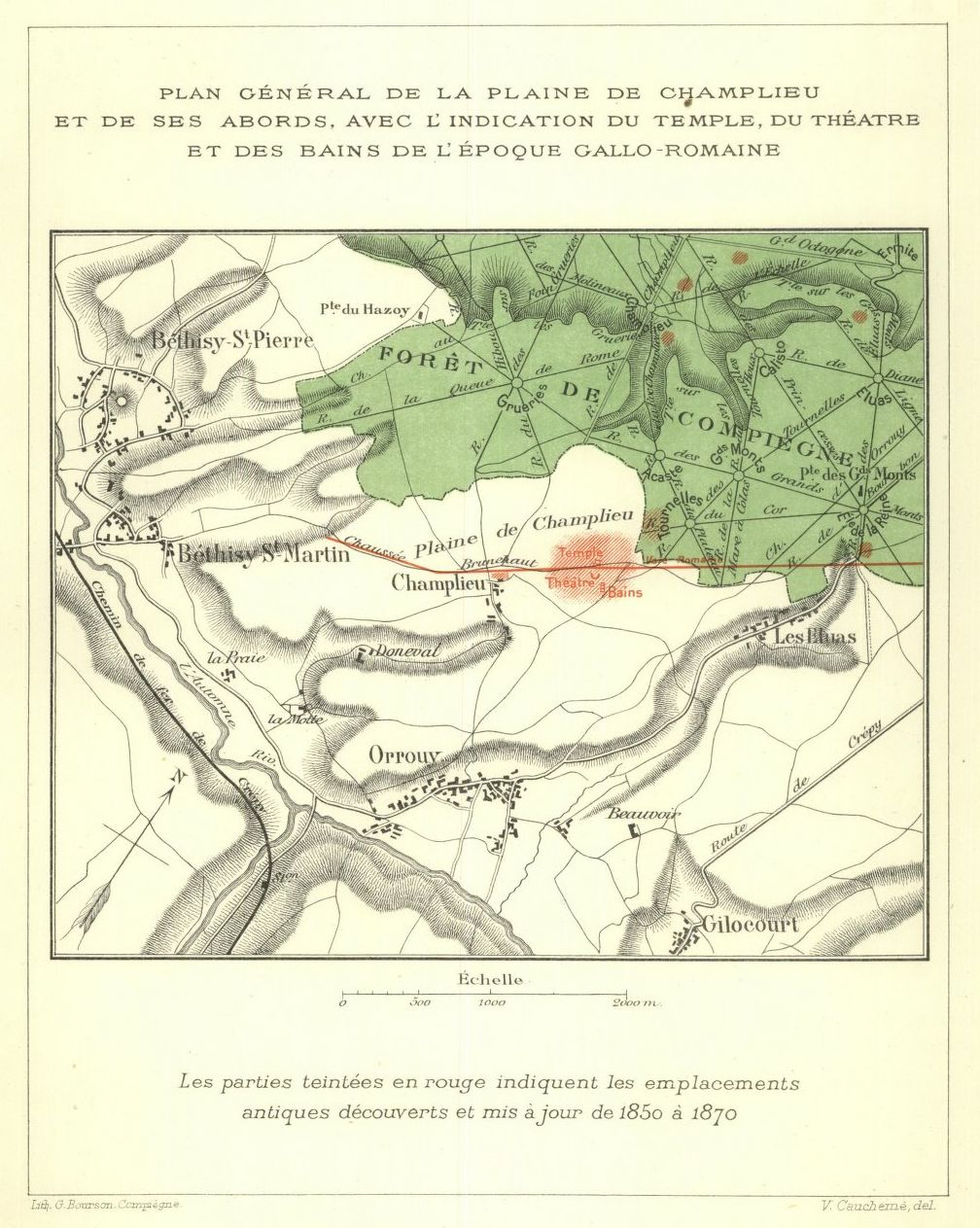 Plan de situation du site archéologique gallo-romain de Champlieu.